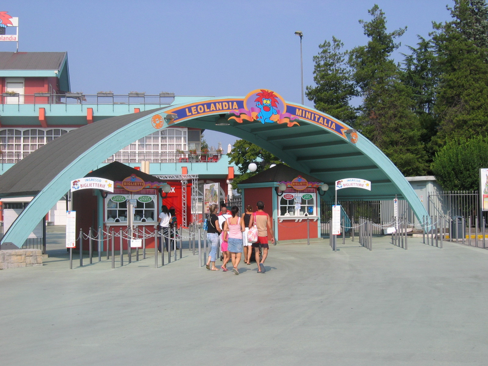 Ingresso Minitalia Leolandia Park